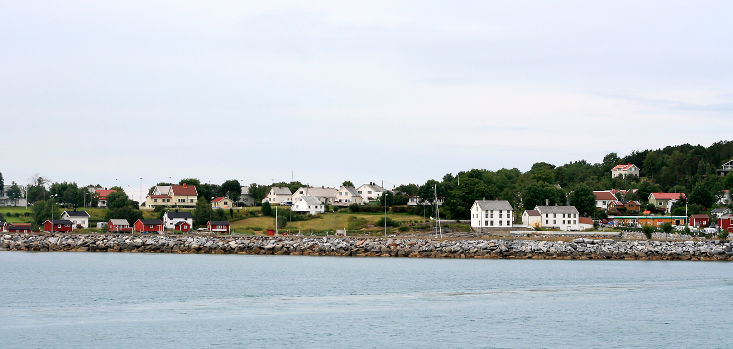 Tjøtta, Alstahaug, Norway.